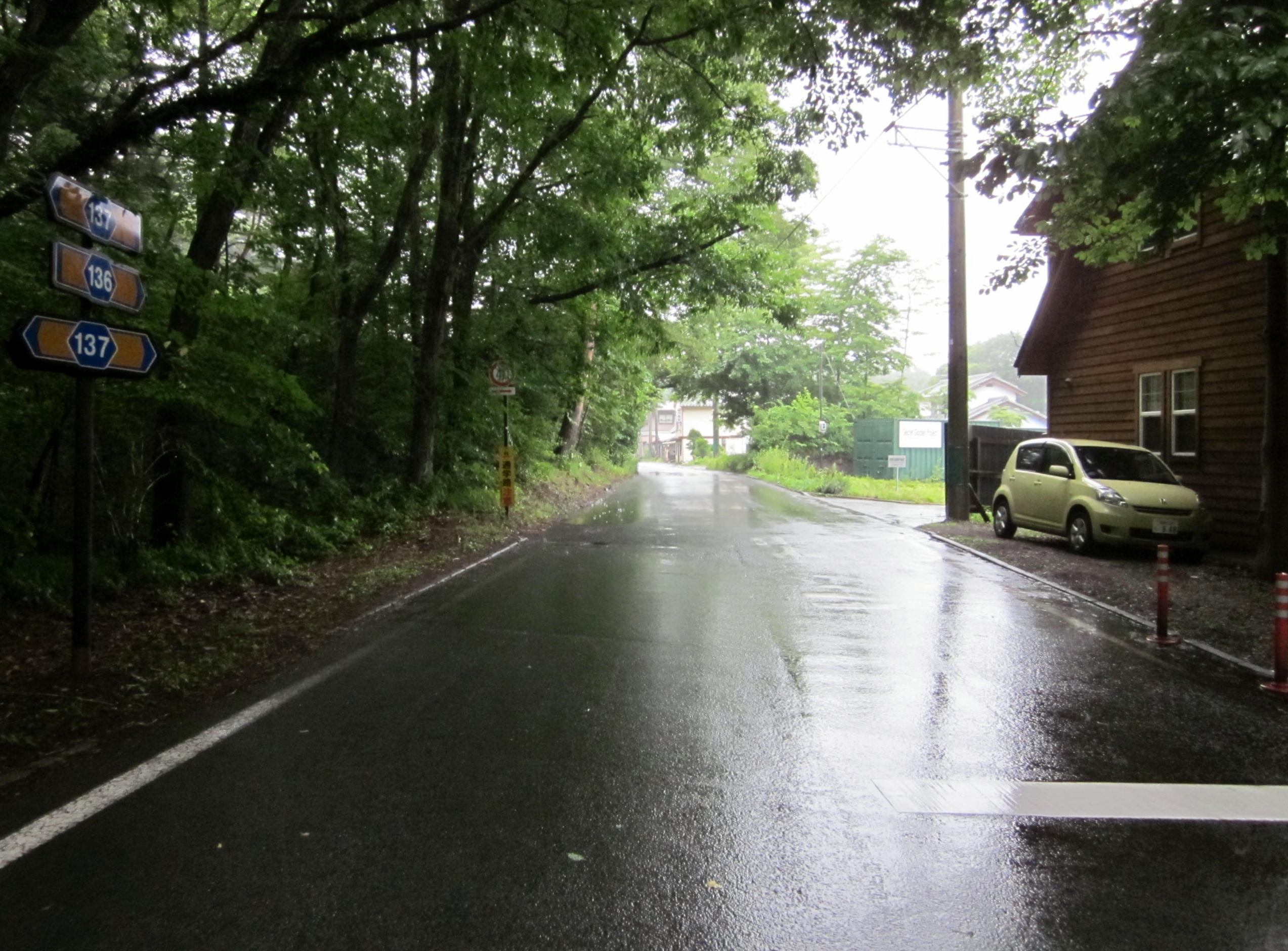 長野県道136号信濃追分停車場線終点（長野県北佐久郡軽井沢町追分）